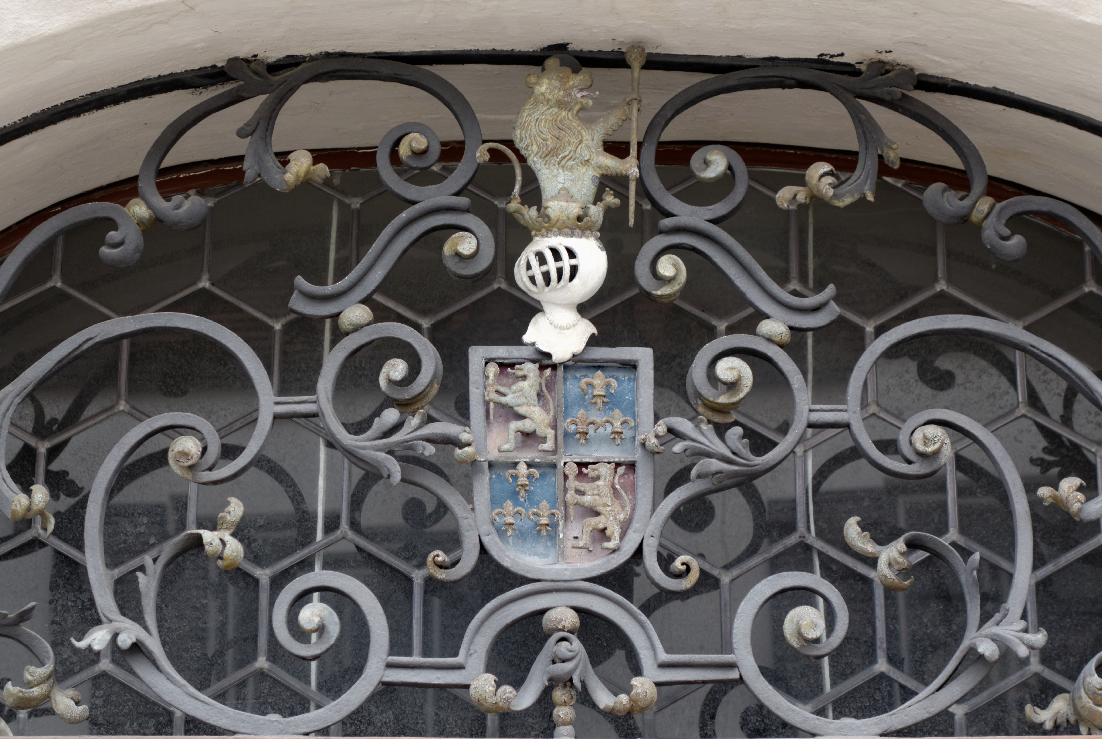 Altes Schulhaus (Friedberg) am Eisenberg Nr. 1